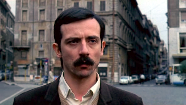 screenshot del film Il caso Moro diretto da Giuseppe Ferrara